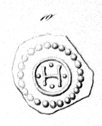 Brakteat aus der Zeit König Håkons III. Das “H” kann Håkon oder auch den Prägeort Hamar bedeuten. 0,048 g. Feingehalt 910 ‰.